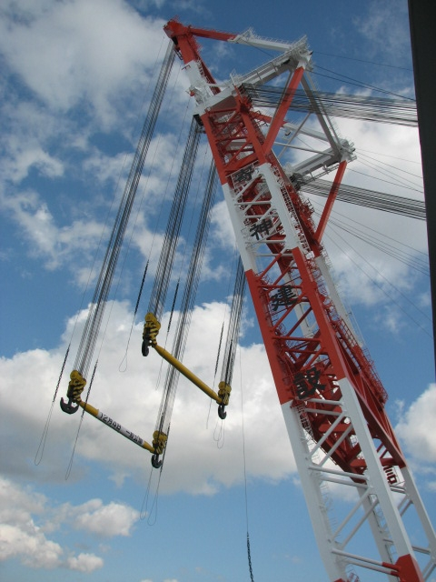 寄神建設所有「洋翔」